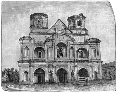 Вид Собора Успения Пресвятой Богородицы во Владимире-Волынском до реставрации. (усыпальница волынских князей и епископов). Гравюра XIX в.